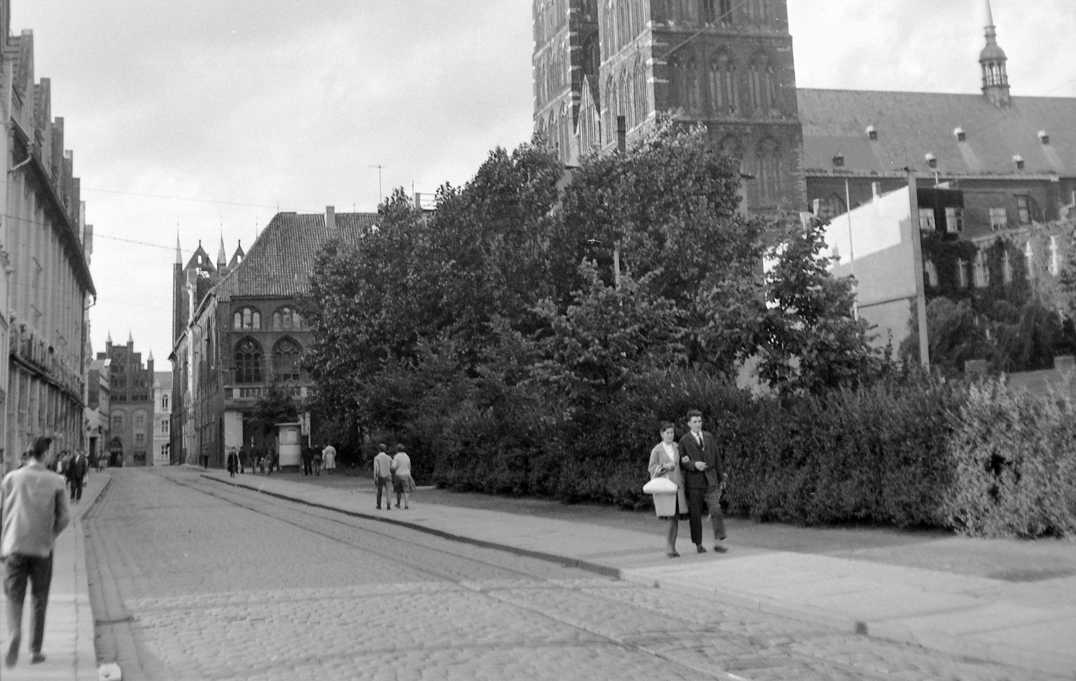 a Városháza és a Szent Miklós-templom. Location: Germany Tags: GDR, church, genre painting Title: a Városháza és a Szent Miklós-templom.